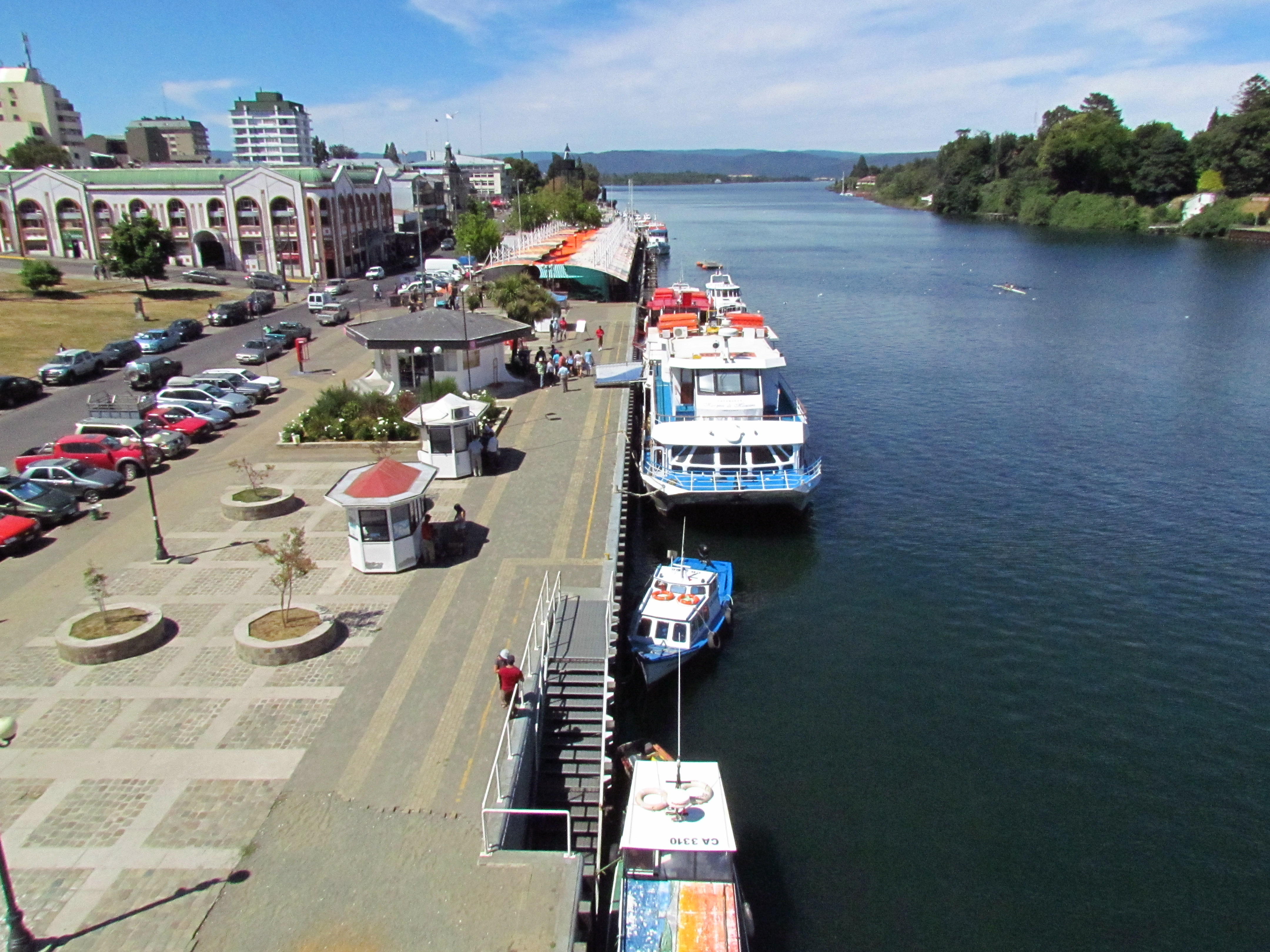 Vista del Puerto de Valdivia, tomada desde puente Pedro de Valdivia